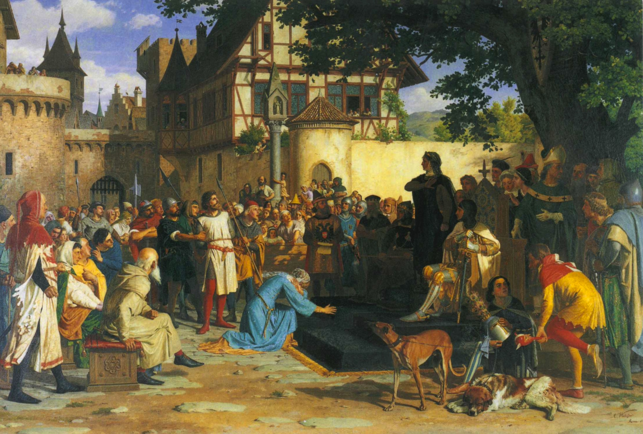 August Weckesser: Gertrud von Wart für ihren Mann um Gnade flehend. Auftragswerk von Johann jakob Im Hof, 1878. (Schloss Kyburg, Leihgabe Kunstmuseum Winterthur)